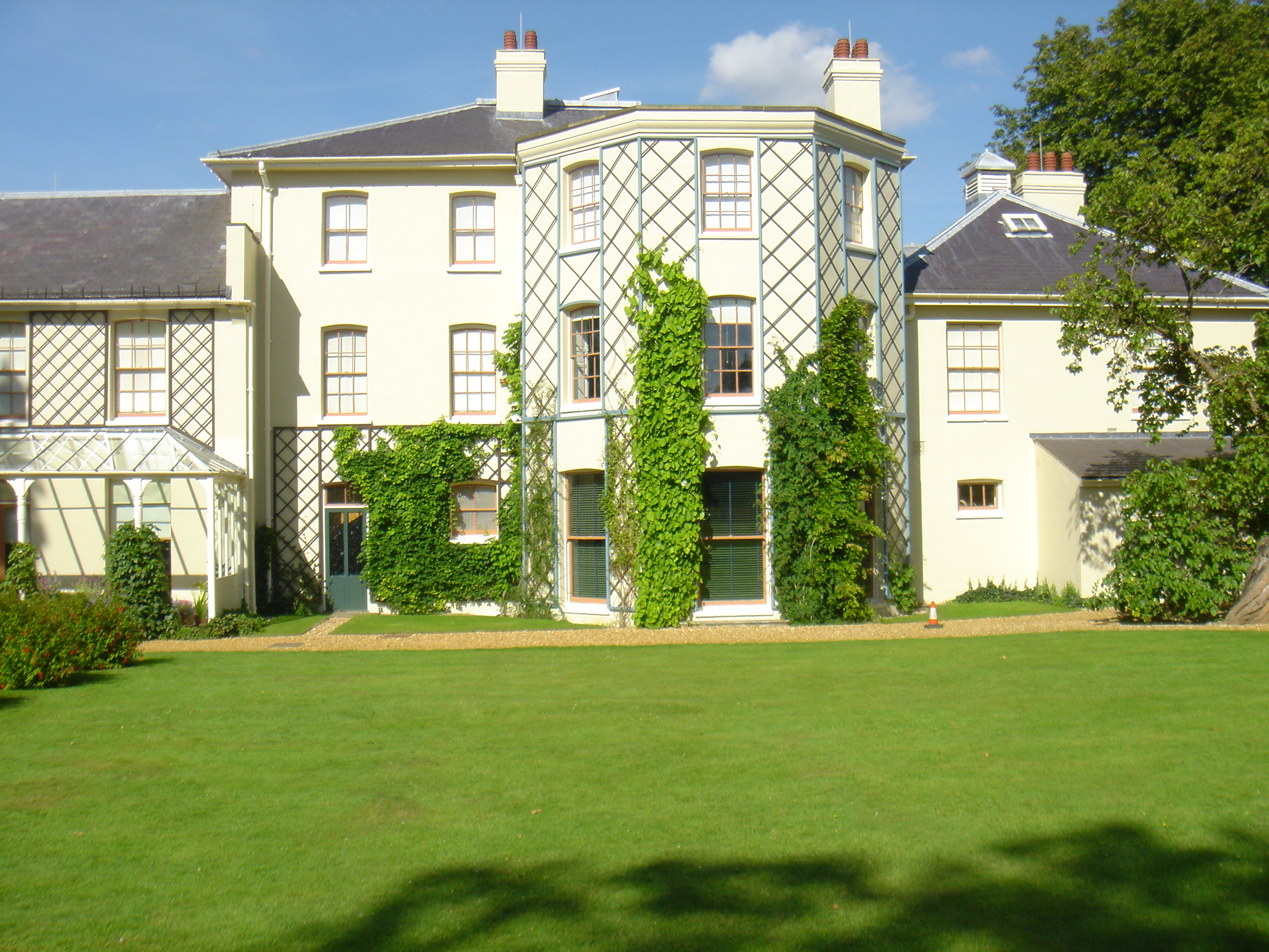 Oscar Boleman Taken August 2007